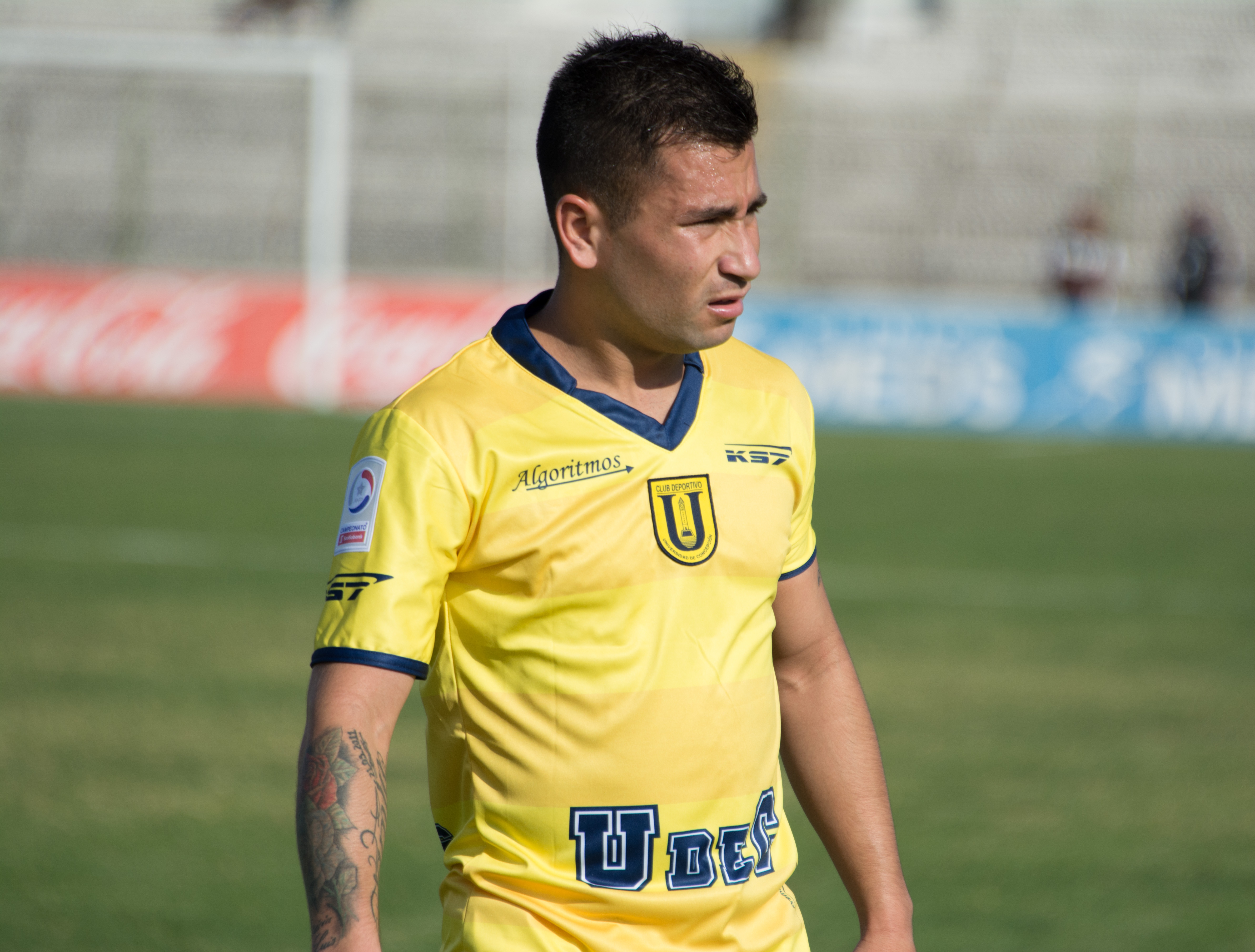 Jean Meneses, Palestino v Universidad de Concepción, Estadio Municipal de La Cisterna, La Cisterna, Santiago, Chile.